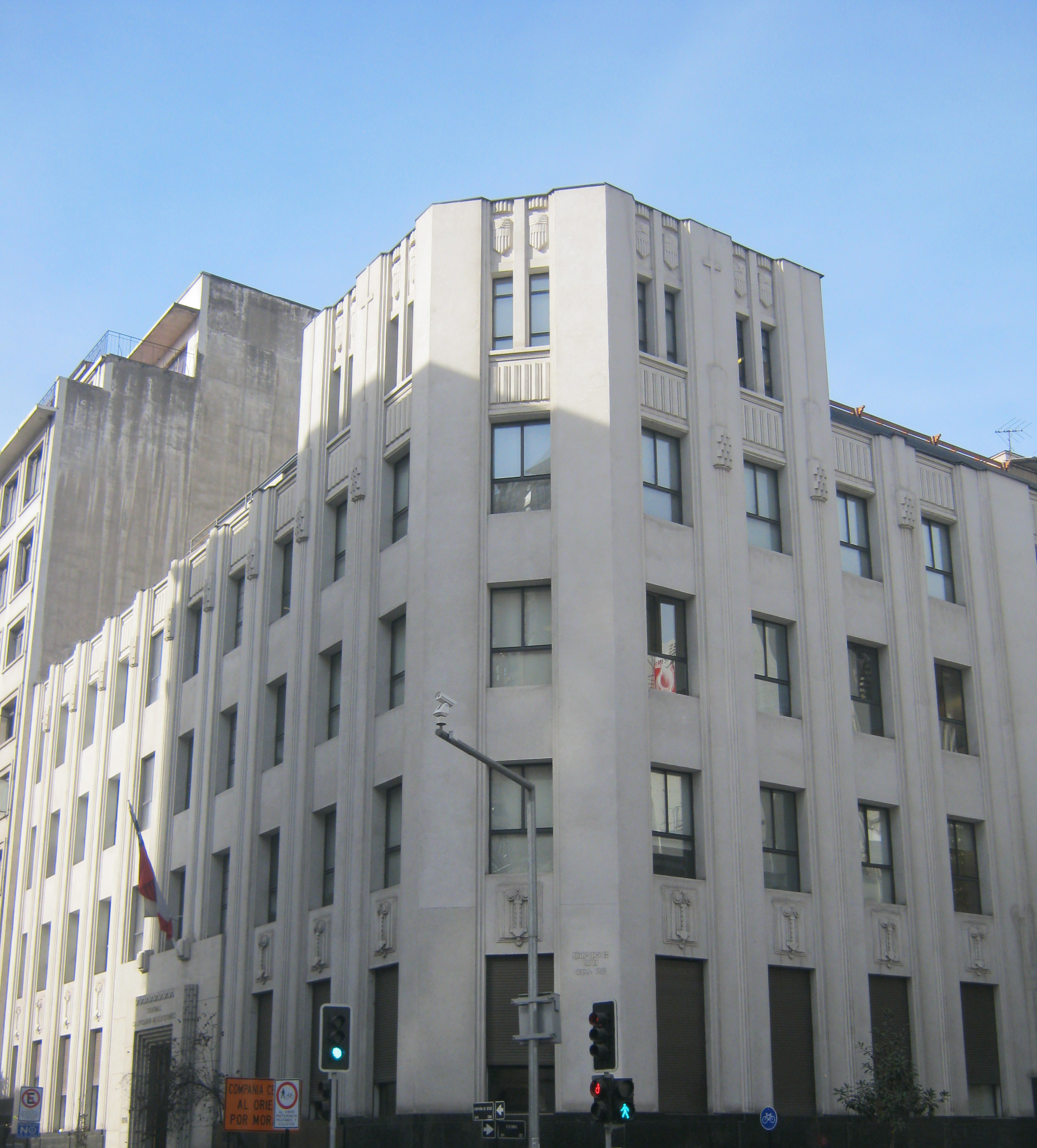 Edificio del Tribunal Calificador de Elecciones de Chile